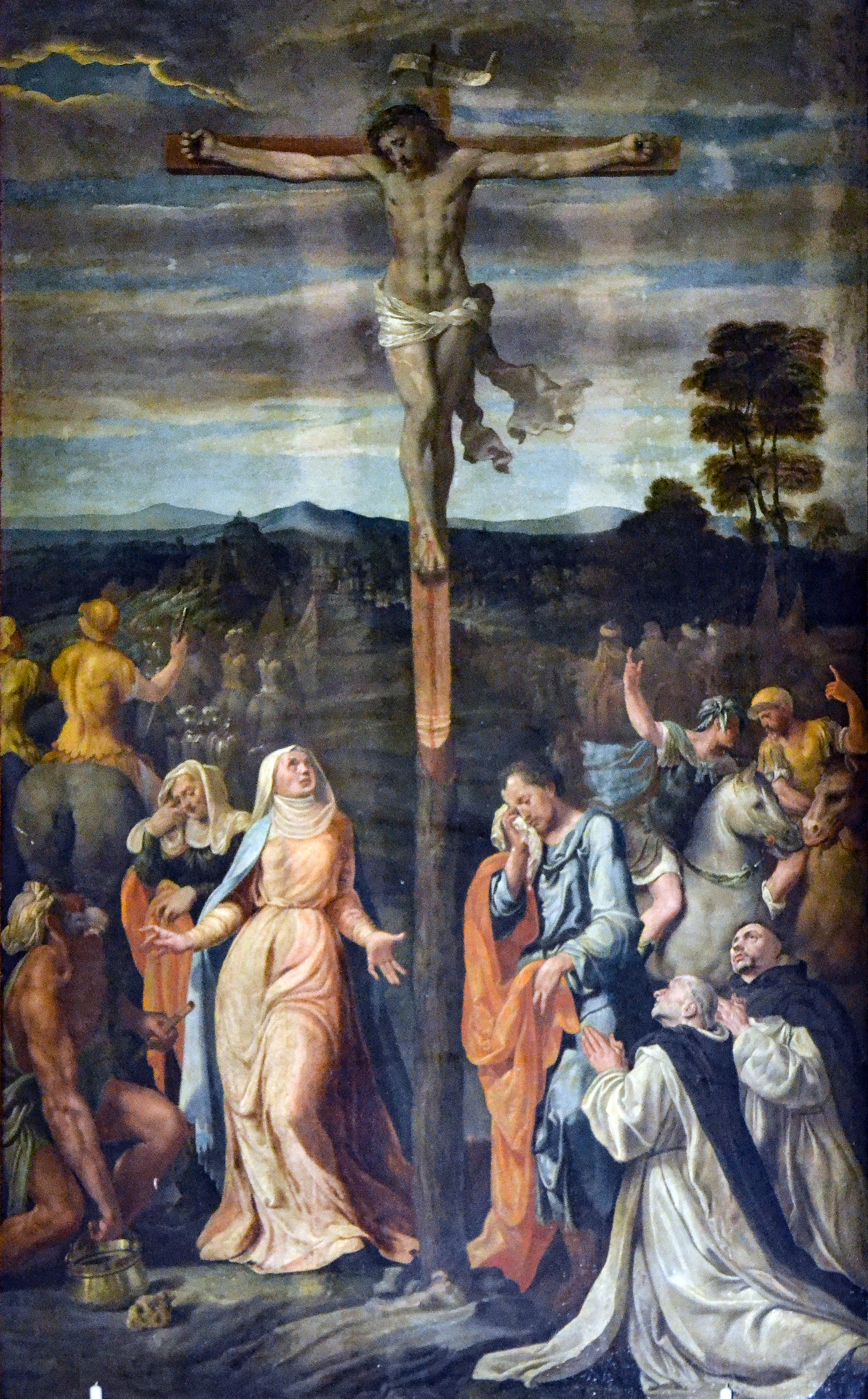 Cappella di San Domenico, o Sauli Quinta a destra. Domenico Sauli commissionò nel 1541’intera decorazione pittorica, comprendente gli affreschi e la pala d’altare, al veneto Giovanni Demìo.